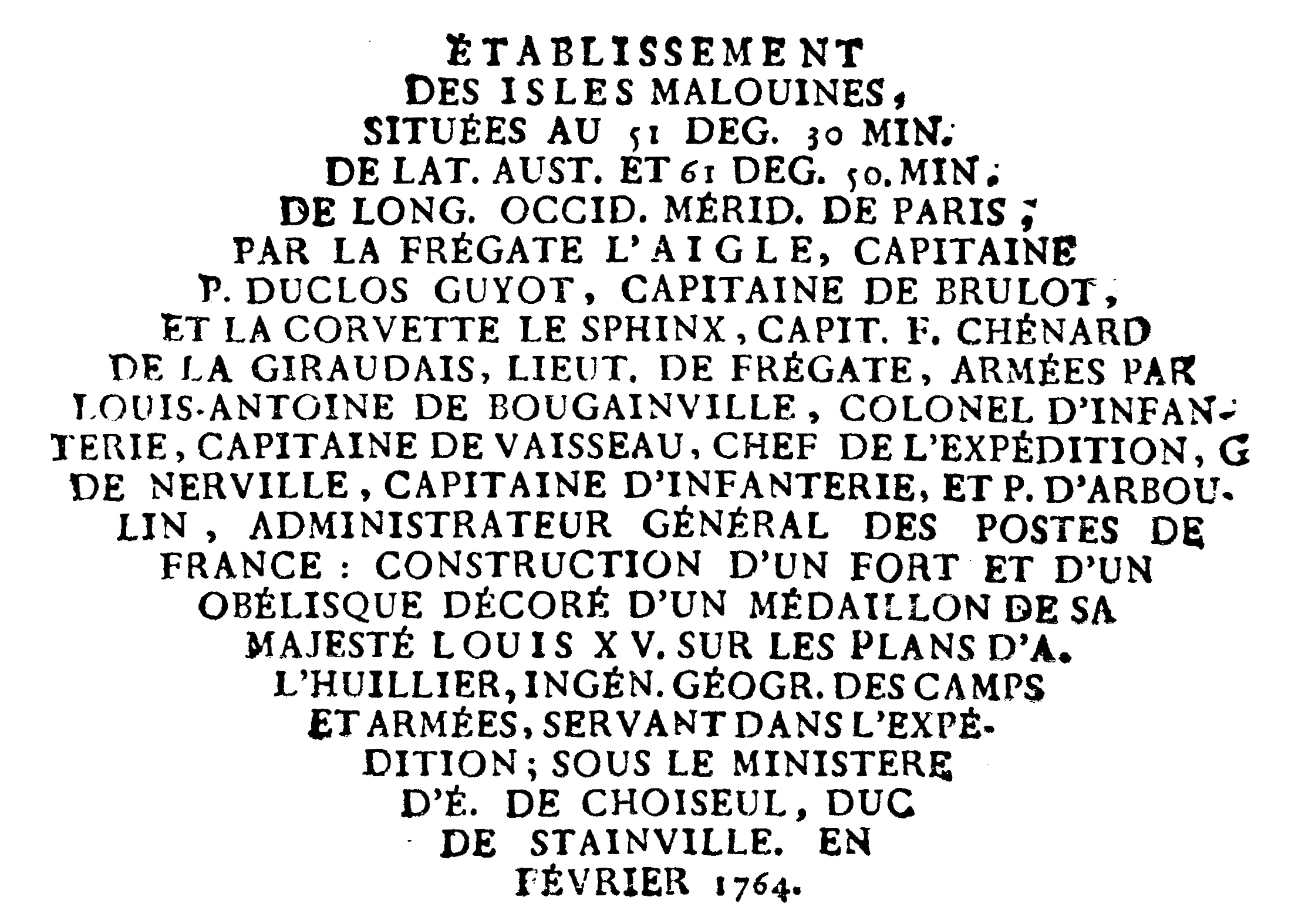 Inscripción grabada en la medalla depositada en los cimientos del obelisco de Puerto Luis, construido por el primer ocupante de las Islas Malvinas.